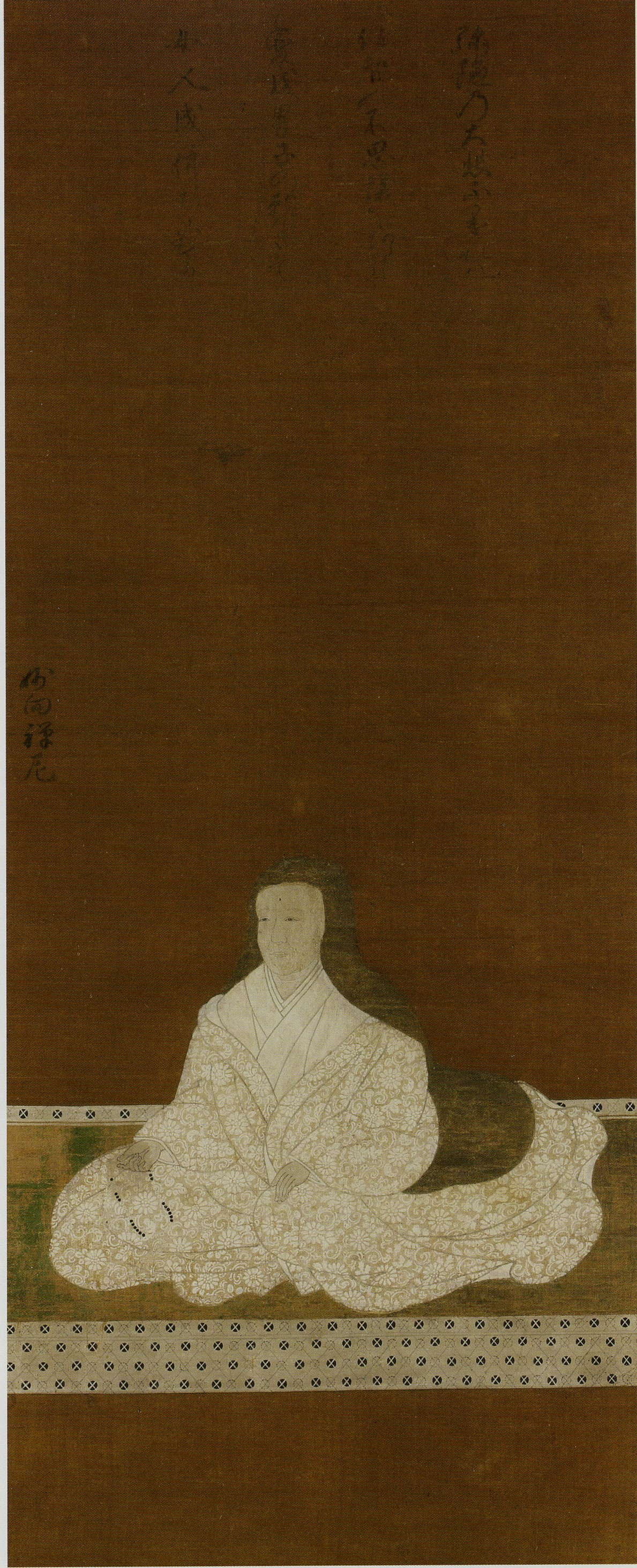 妙向尼(森可成正室)の肖像画。